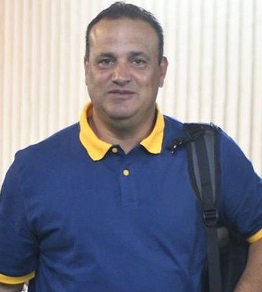 Foto del entrenador Leonardo Fernández